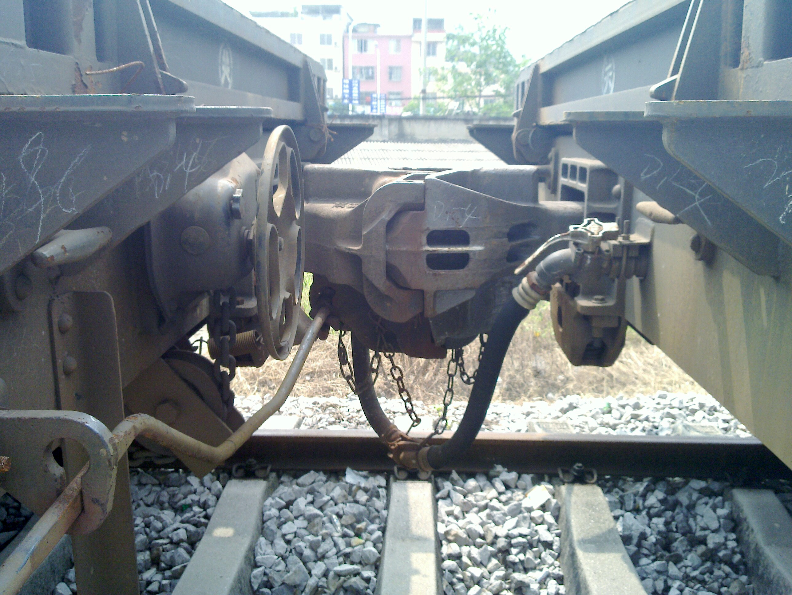 两节NX70A平车的F型车钩连挂